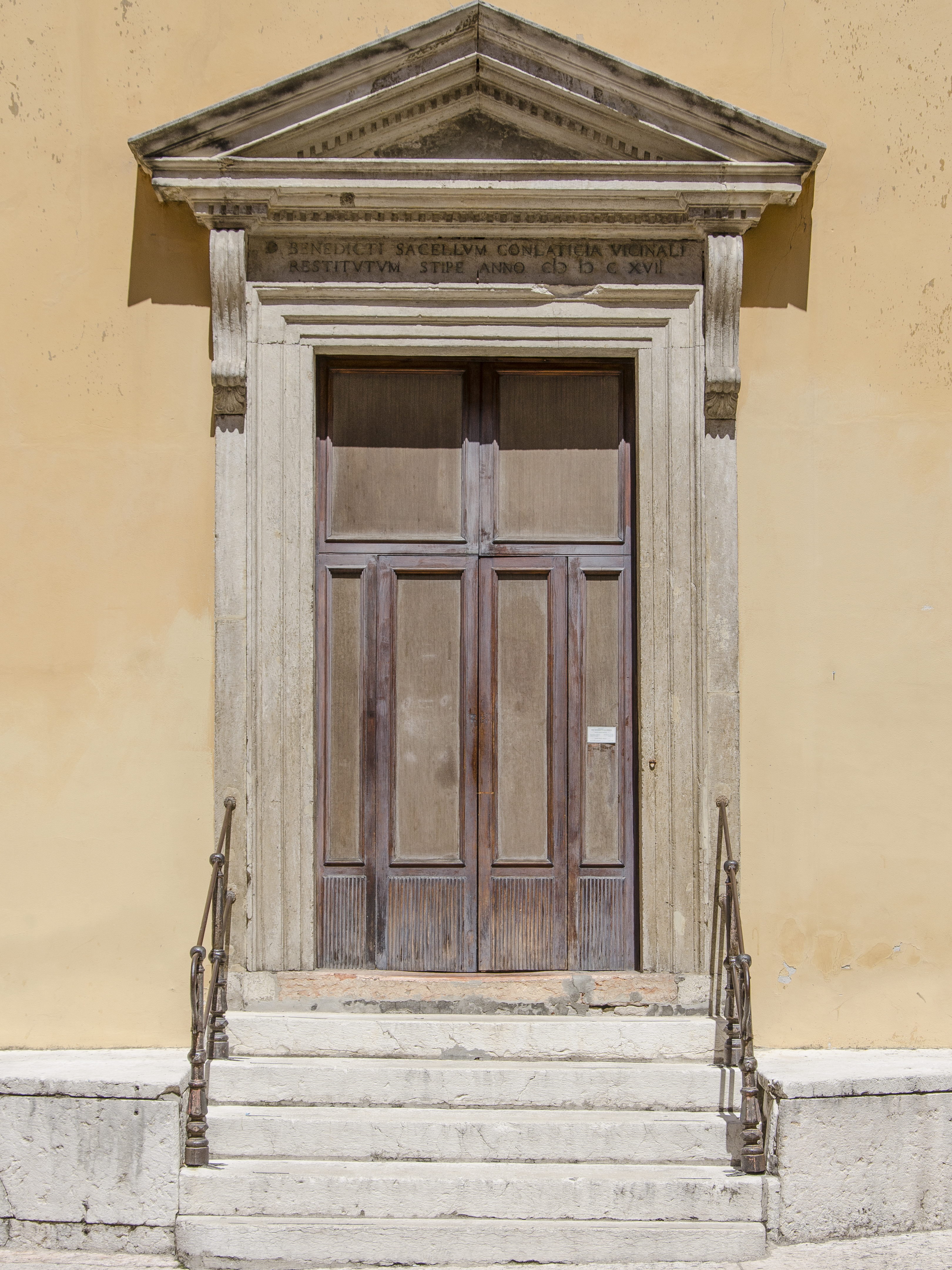 Portale d'ingresso della chiesa di San Benedetto al Monte a Verona